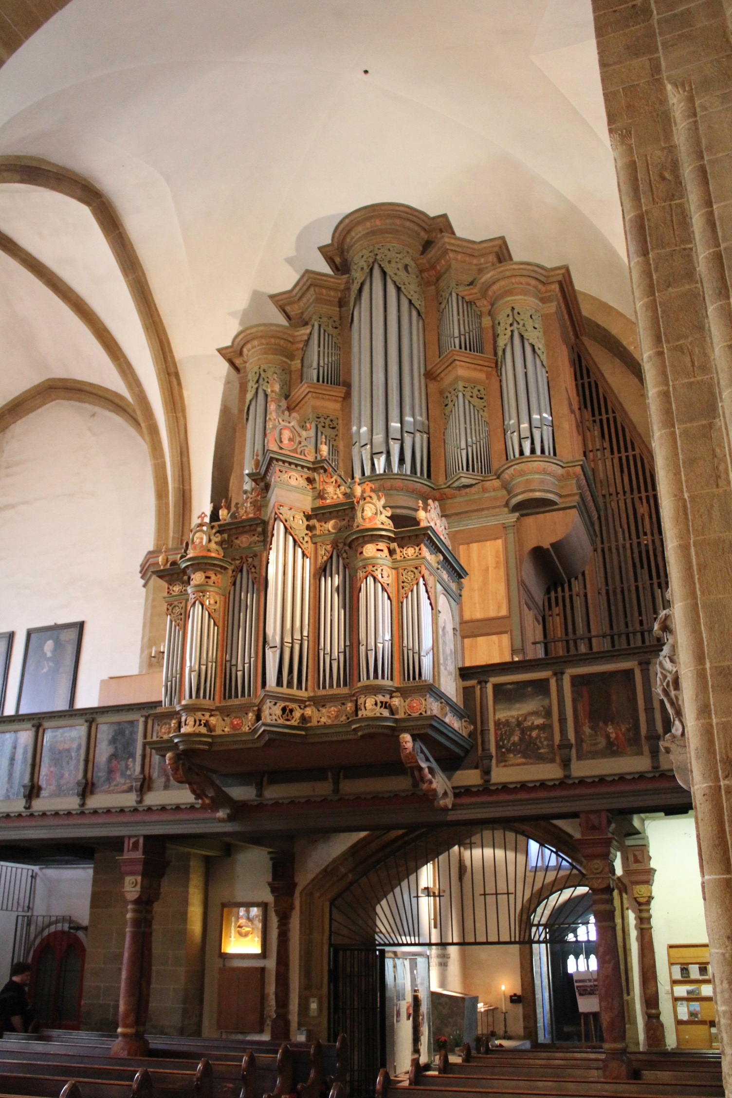 Blick auf die Orgelempore und Orgel, St. Martini Minden